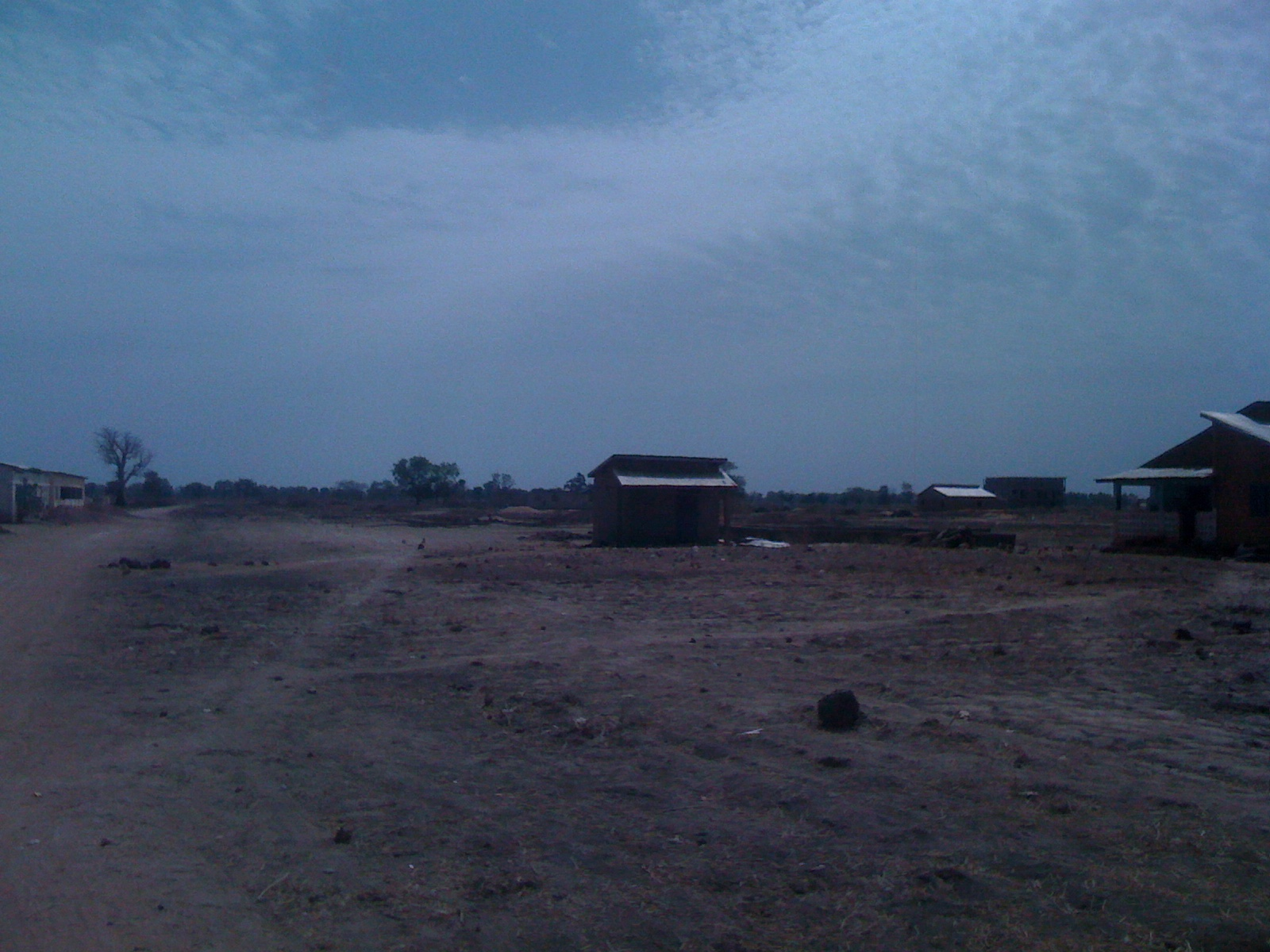 ici ce trouvait la marre de King Kong, aujourd'hui enseveli une bande de sable lié à l’érosion de la Plaine de Hafia, le Nord du quartier Hafia endroit autrefois propice à la riziculture.